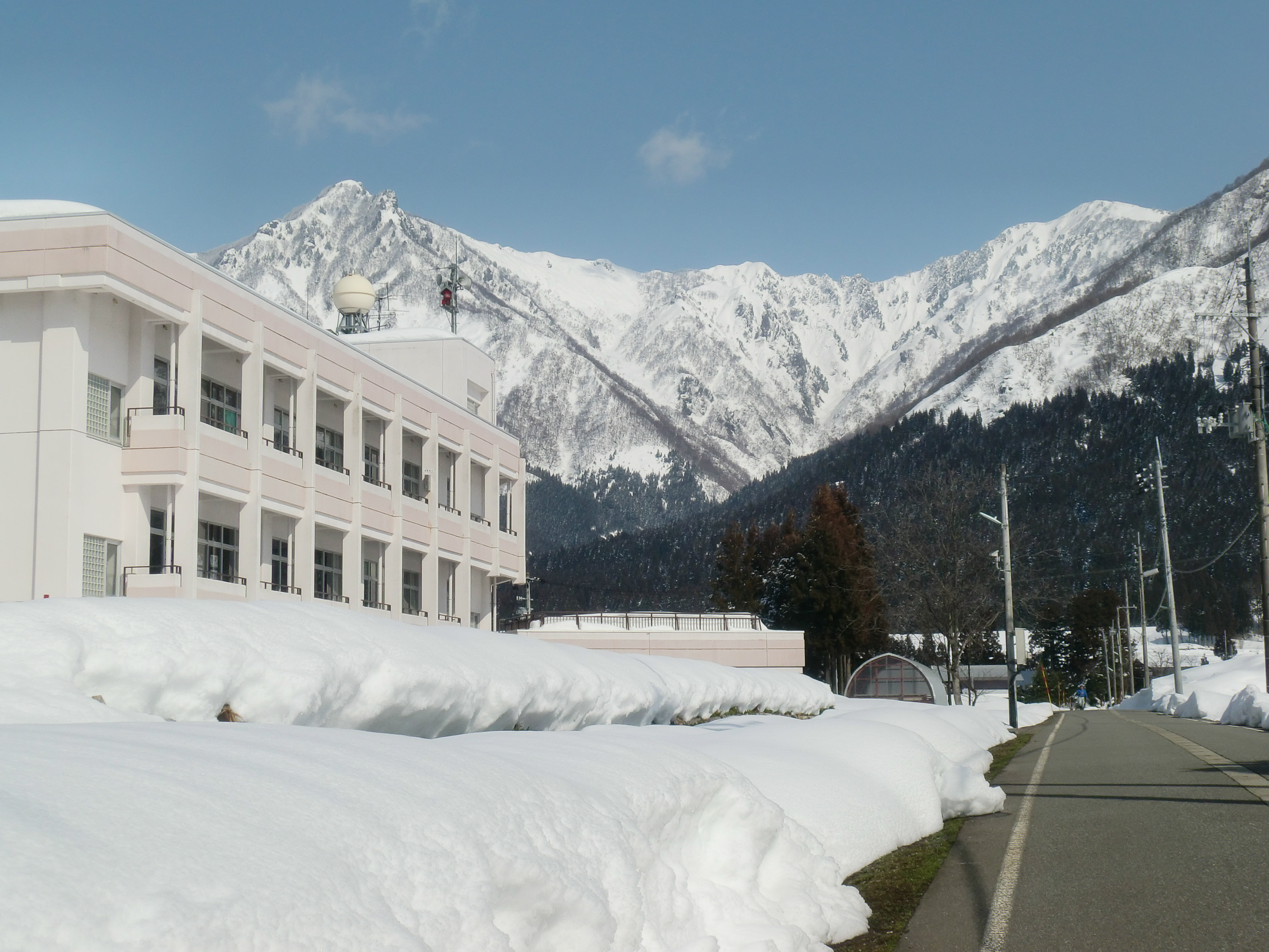 校歌は『銀冠高き金城を雪の朝に仰ぎつつ ・・・・・・』